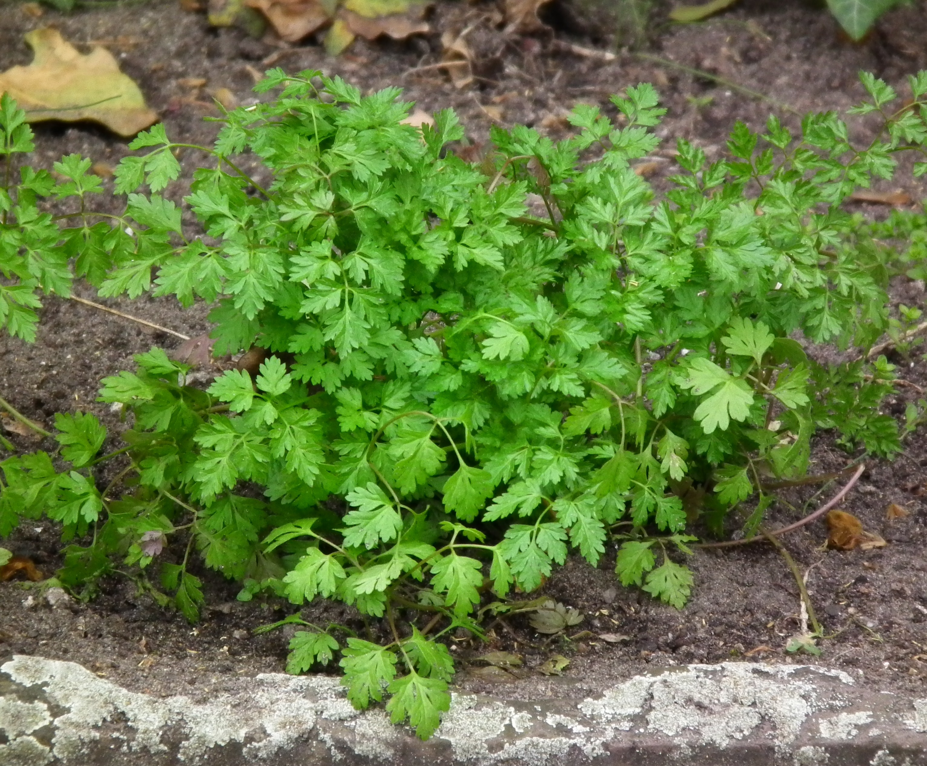 Echter Kerbel (Anthriscus cerefolium), fotografiert in Südhessen (Deutschland)